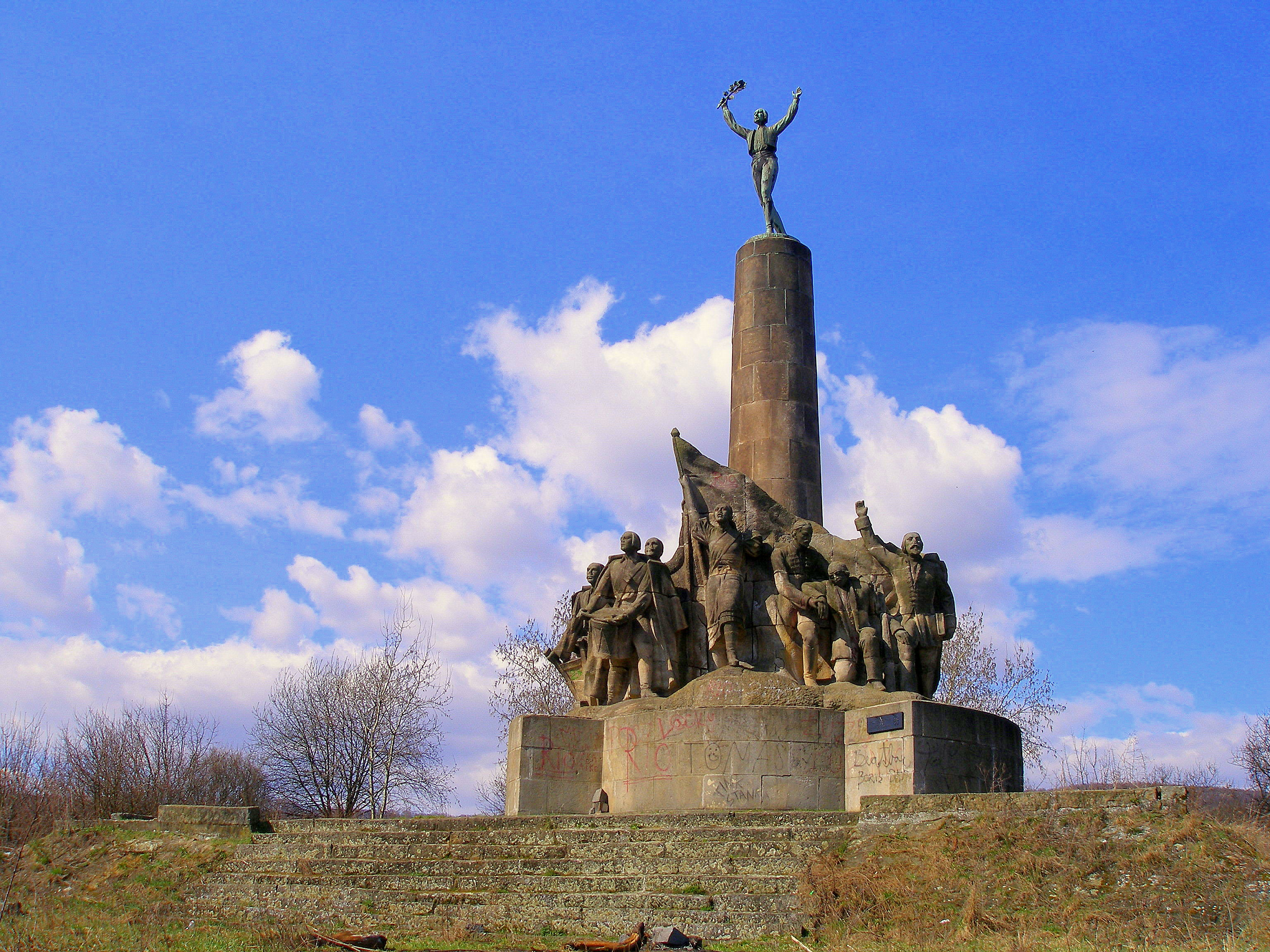 Kopec Furča nad obcou Haniska pri Prešove. Pomník sedliackeho povstania. This medium shows the protected monument with the number 707-1465/0 in the Slovak Republic.